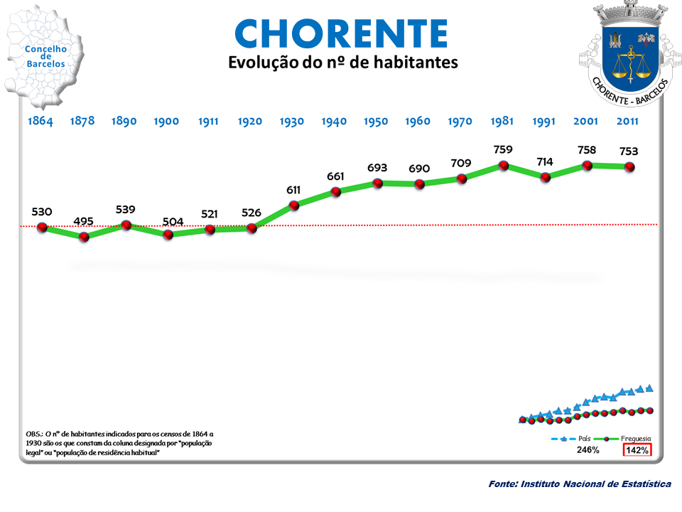 Censos 1864/2011